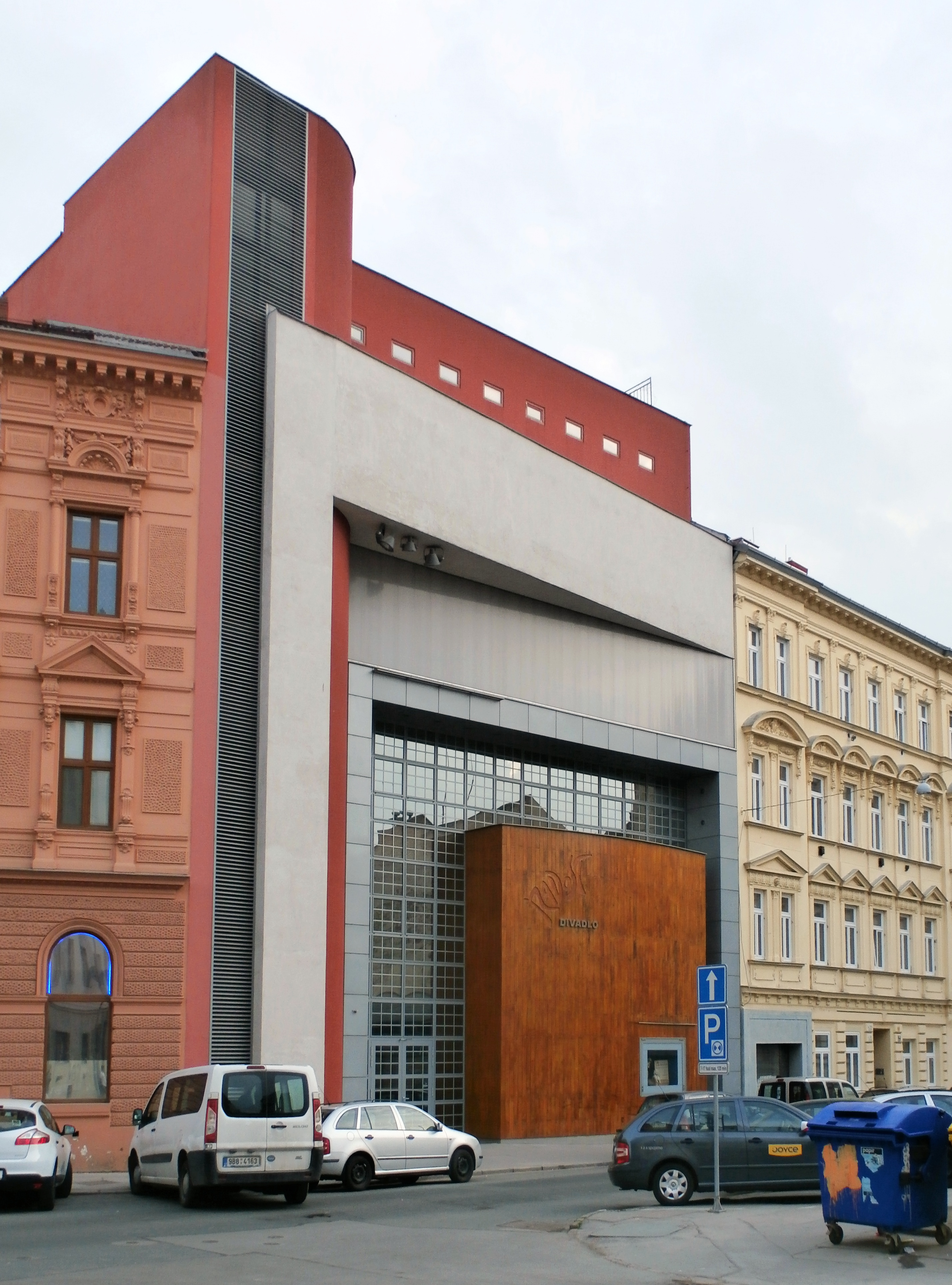 Brno, ul. Bratislavská - Divadlo Radost.